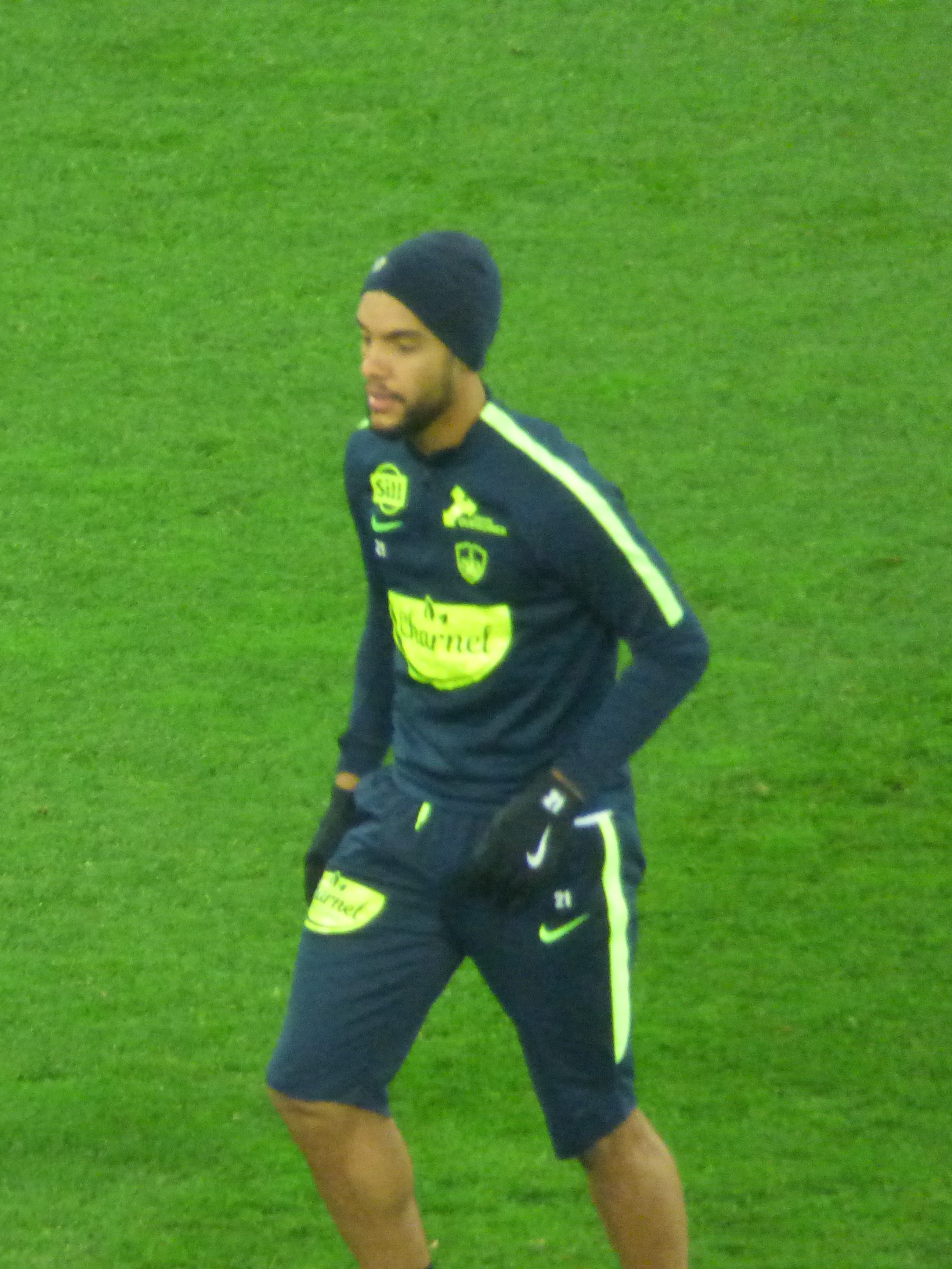 Jean-Charles Castelletto avant le match RC Lens / Stade brestois, le 4 décembre 2018, comptant pour la dix-septième journée du championnat de France de football de Ligue 2 2018-2019, au Stade Bollaert-Delelis.